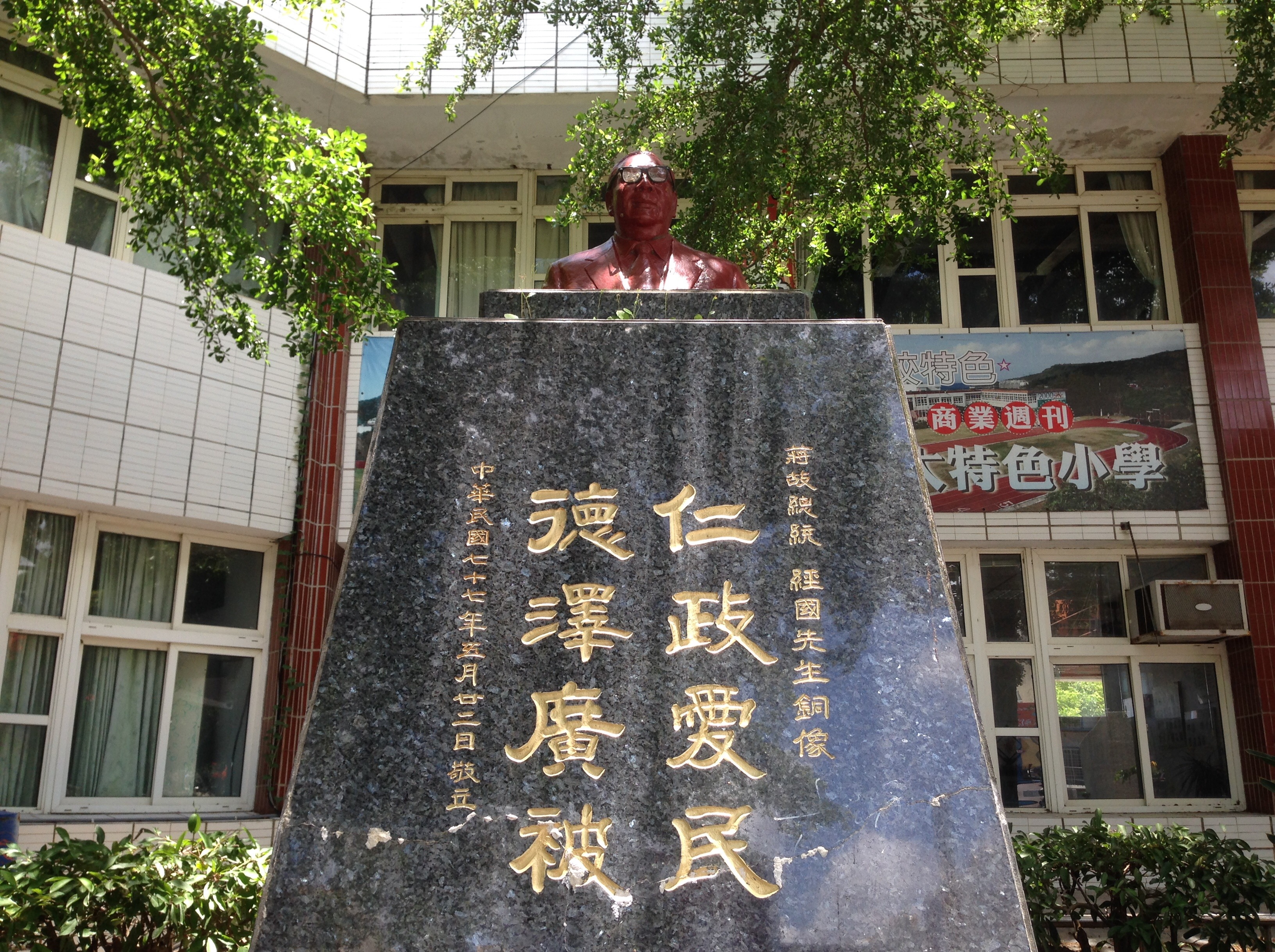 中文（台灣）: 墾丁國小蔣經國銅像